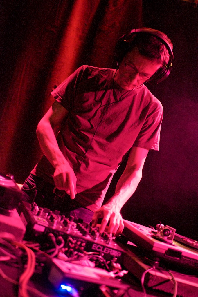 Roland Casper@Cologne Commons 2009 festival